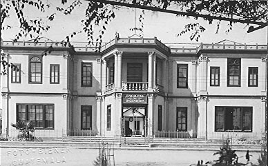 Antogia Escuela Facultativa de Ingeniería.